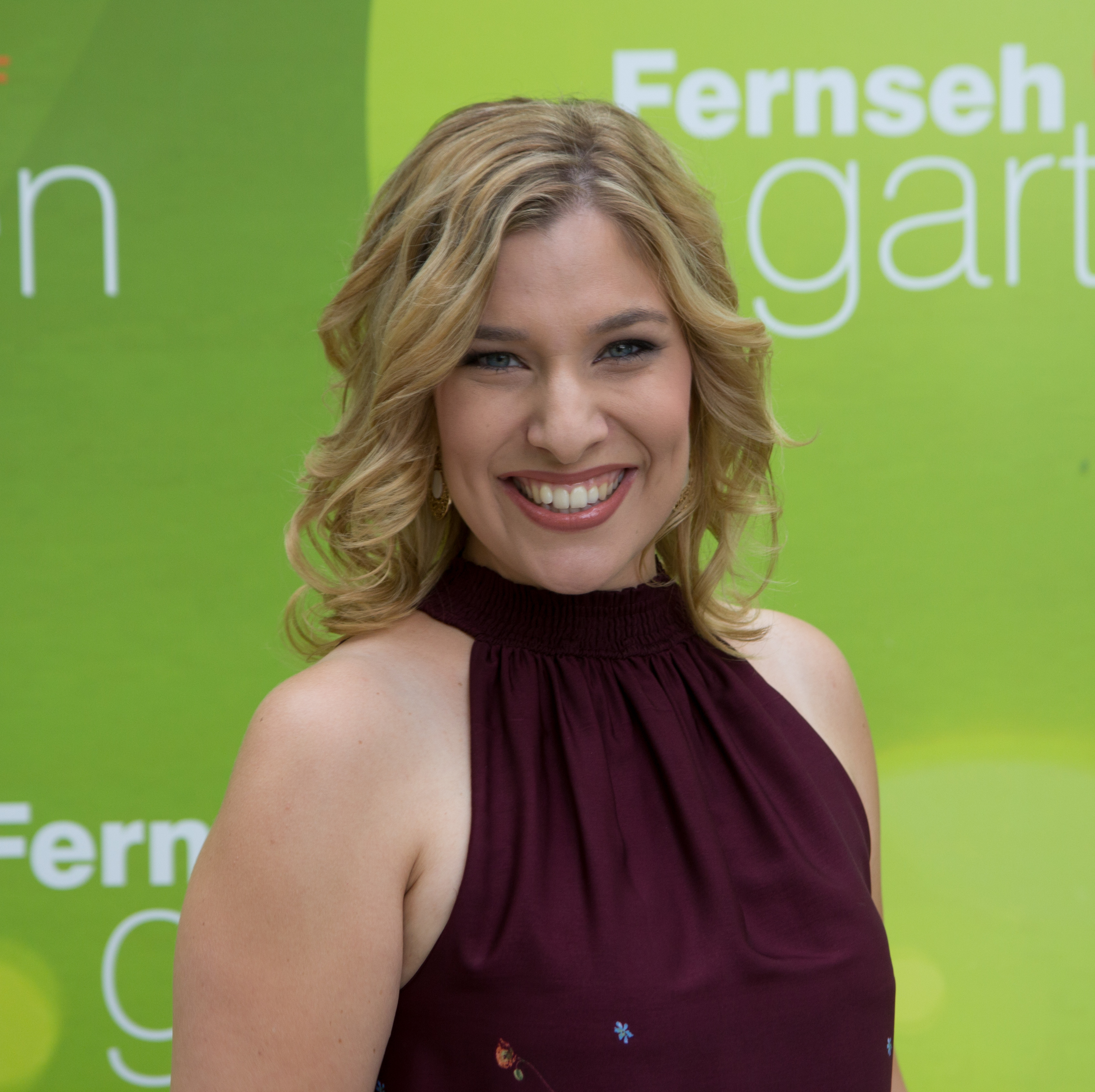 Laura Wilde als Gast im ZDF-Fernsehgarten am 2. September 2018 in Mainz.